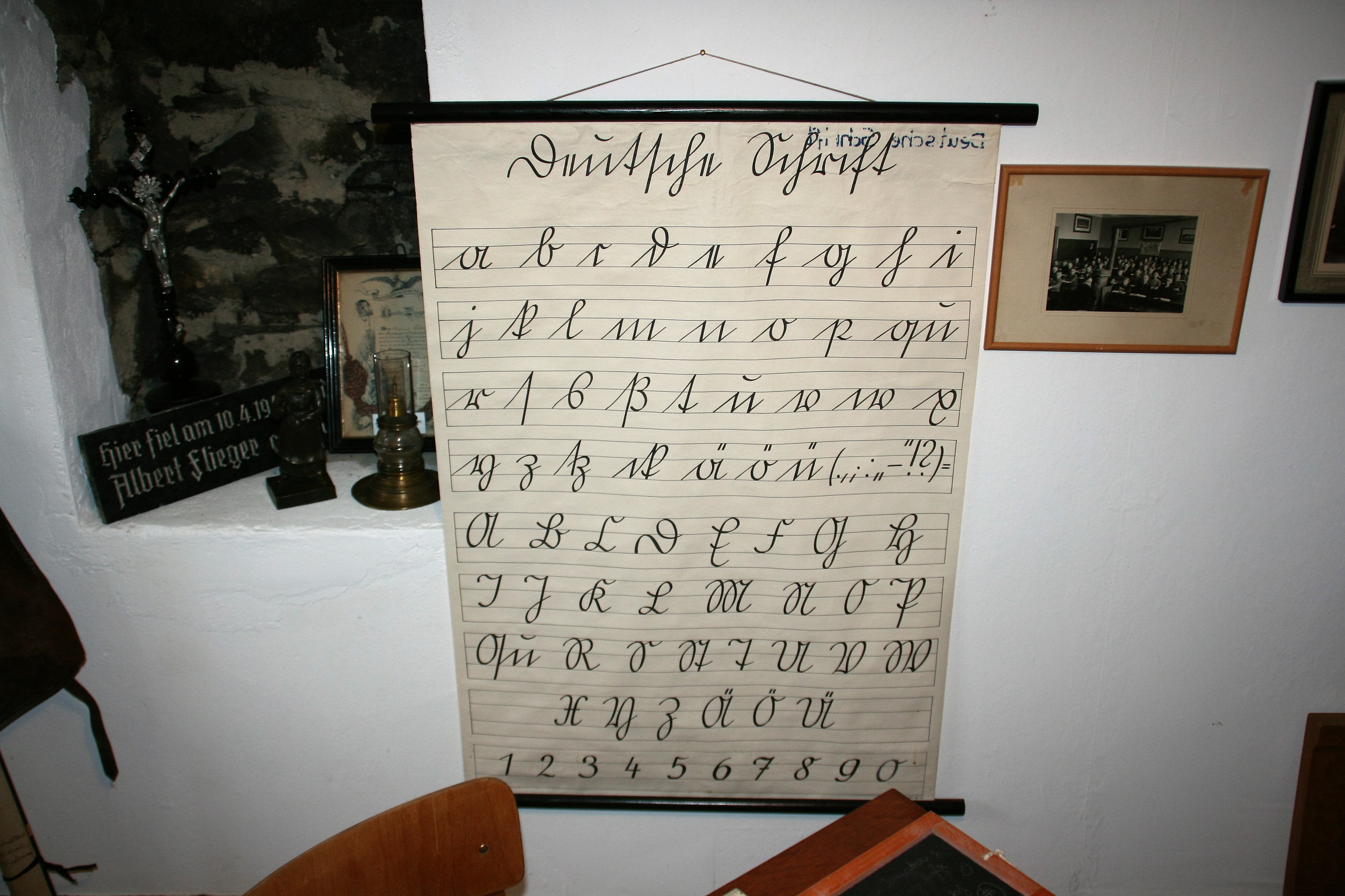 Schrifttafel "Deutsche Schrift" (Offenbacher Schrift) im Heimatmuseum Spieker in Herscheid (Märkischer Kreis)